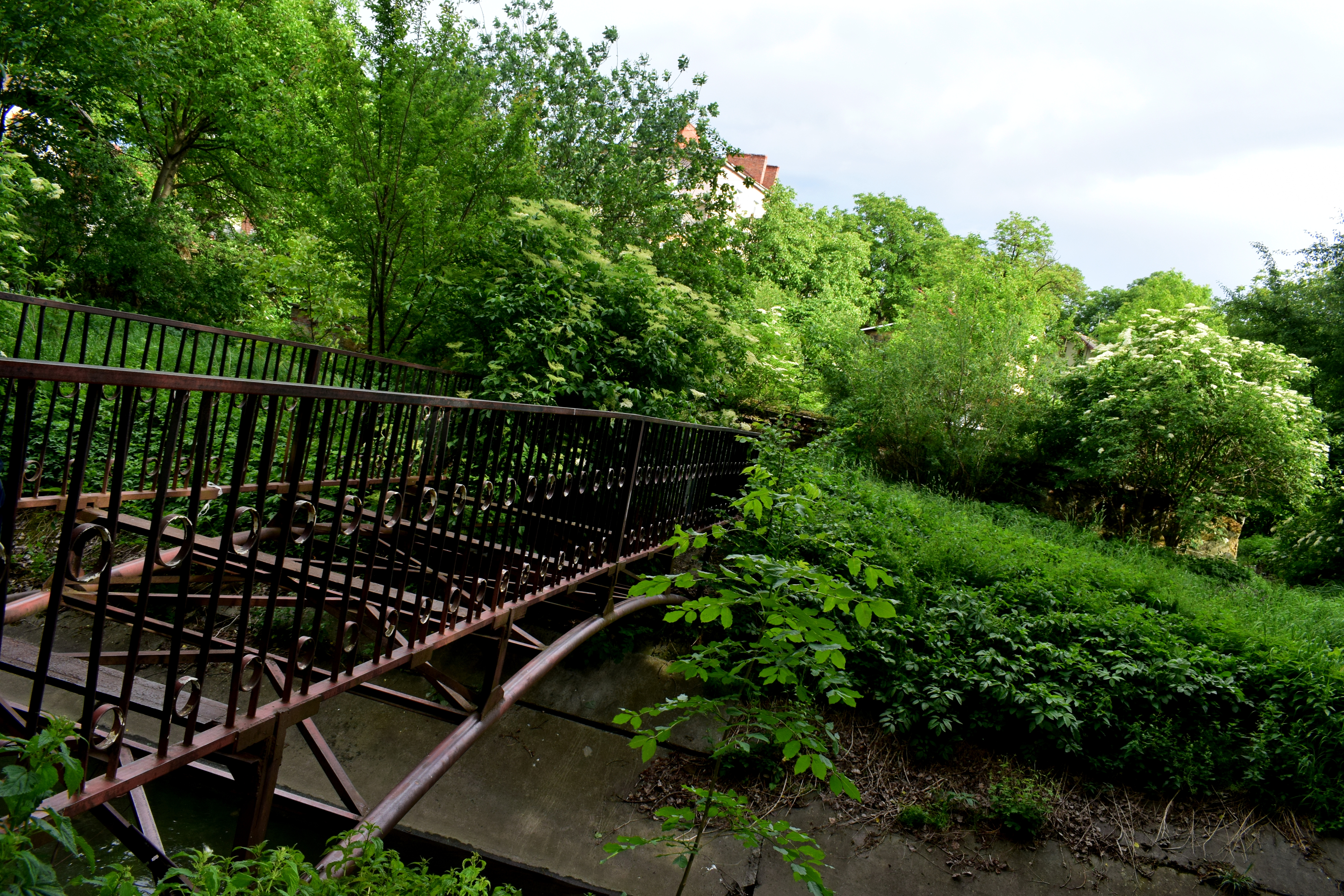 Парк ім. генерала Васильєва, м. Дрогобич Металевий каркас моста до закинутого туалету